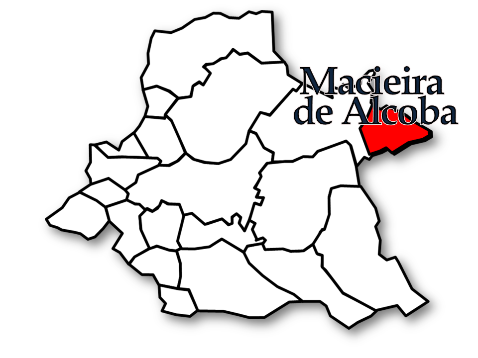 Censos 1864/2011